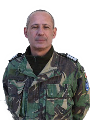 Coronel de Infantaria Luís Miguel Afonso Calmeiro